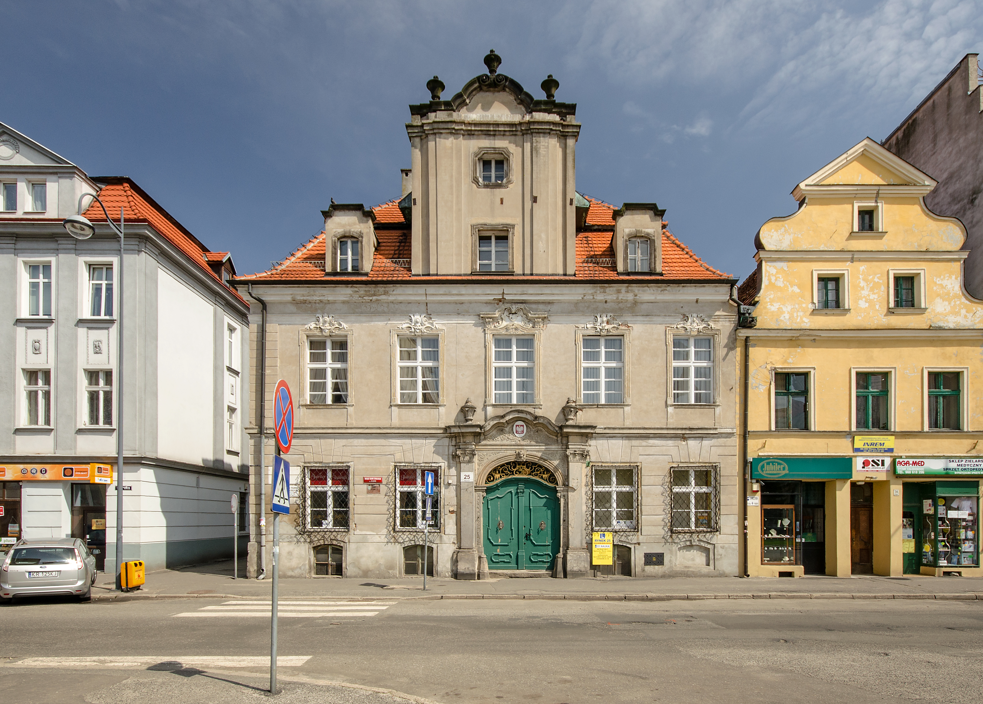 Oława, dom (apteka), ob. USC, 1594, 1659, 1742-46, 1974-76